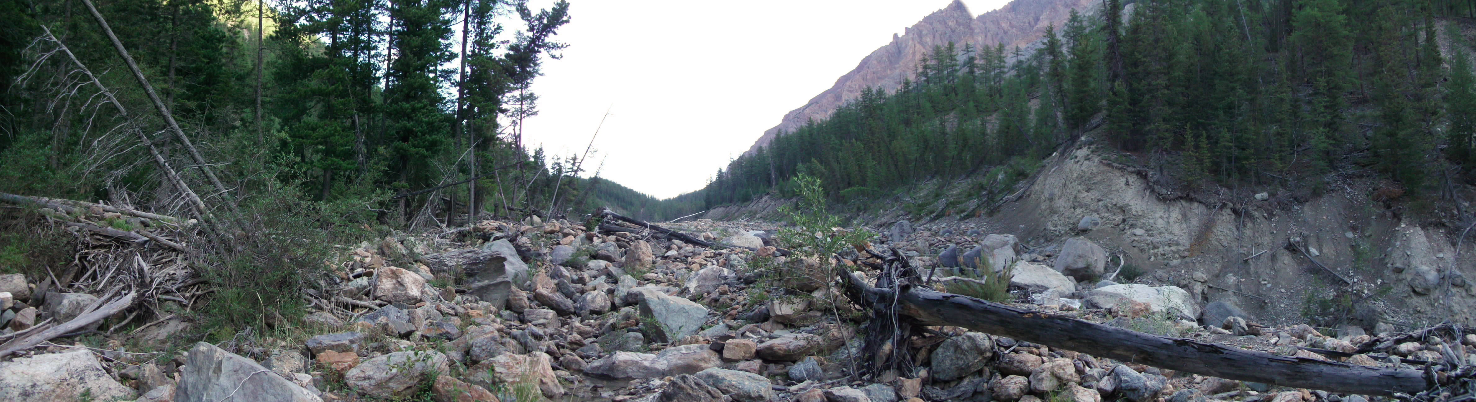 Подъем по реке Камрю к озеру